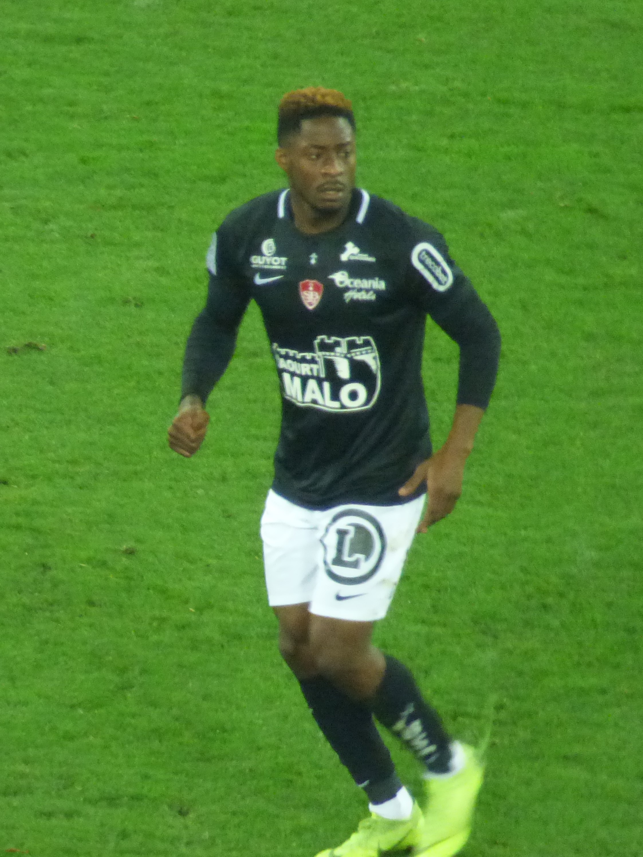 Kévin Mayi lors du match RC Lens / Stade brestois, le 4 décembre 2018, comptant pour la dix-septième journée du championnat de France de football de Ligue 2 2018-2019, au Stade Bollaert-Delelis.